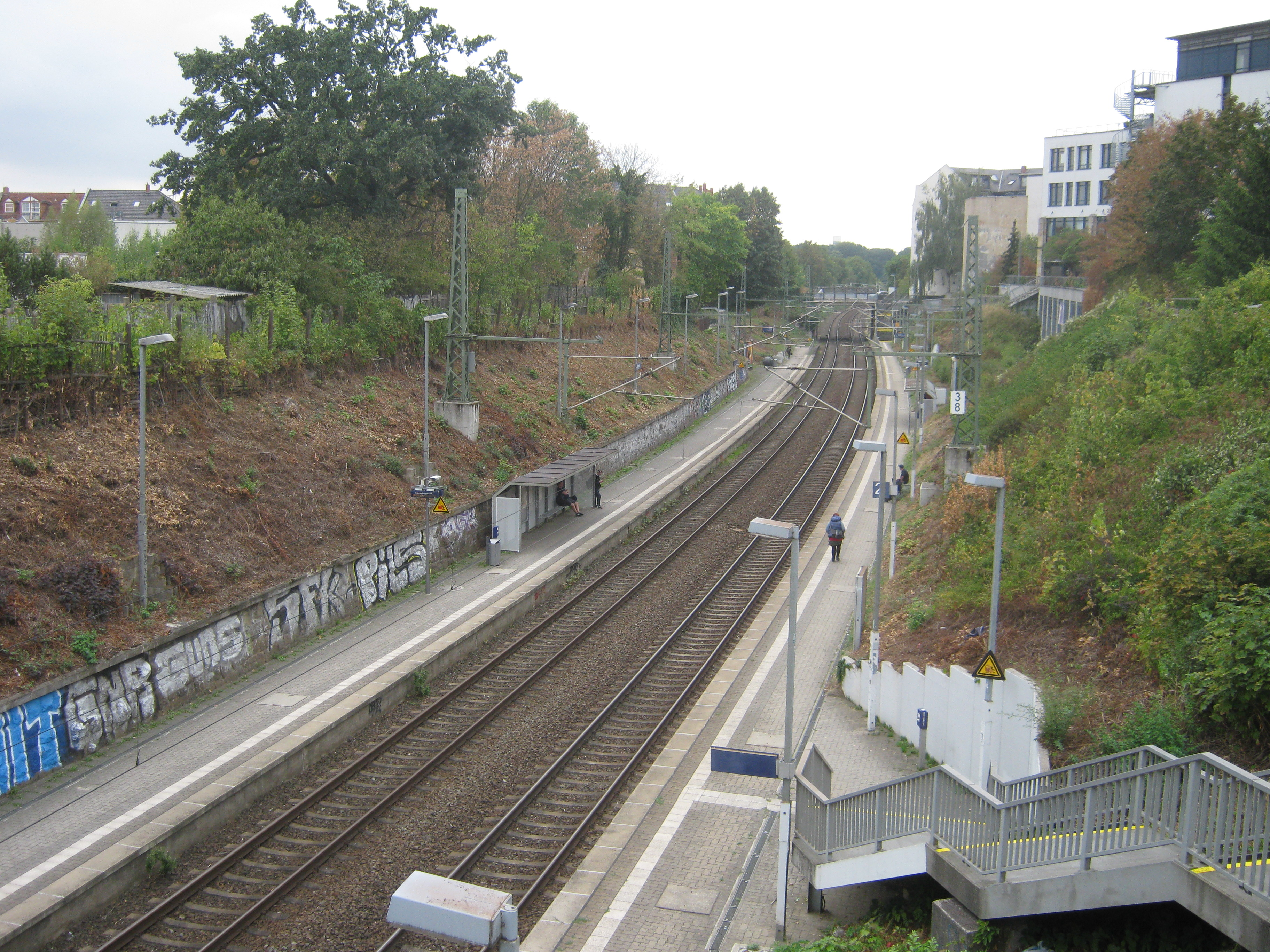 Zum S-Bahn-Netz der S-Bahn Mitteldeutschland gehört auch der Haltepunkt Leipzig-Möckern, welcher zum Zeitpunkt der Aufnahme von der S-Bahn-Linie 1 bedient wurde. Der Haltepunkt Möckern ist aber auch Haltepunkt von anderen Zuglinien. Der Haltepunkt liegt an der Bahnstrecke Leipzig–Großkorbetha und ist sowohl über die Georg-Schuhmann-Straße als auch über die Kirchbergstraße zu erreichen.